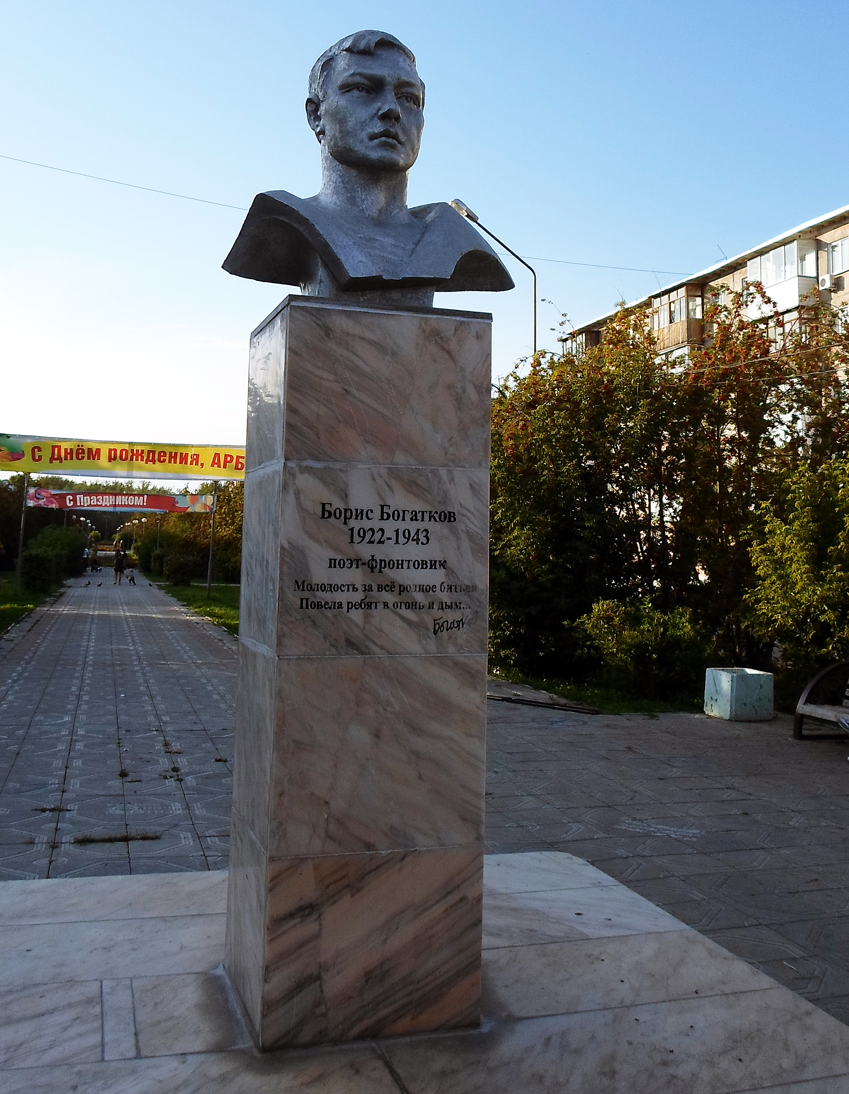 Памятник-бюст поэта-фронтовика Бориса Богаткова на Ачинском "Арбате".